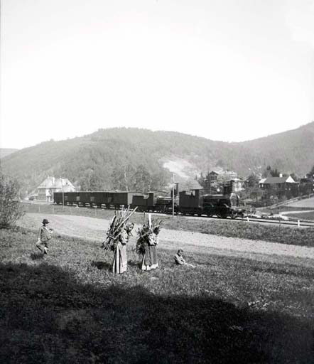 Adamov, rychlík / Adamov, fast train